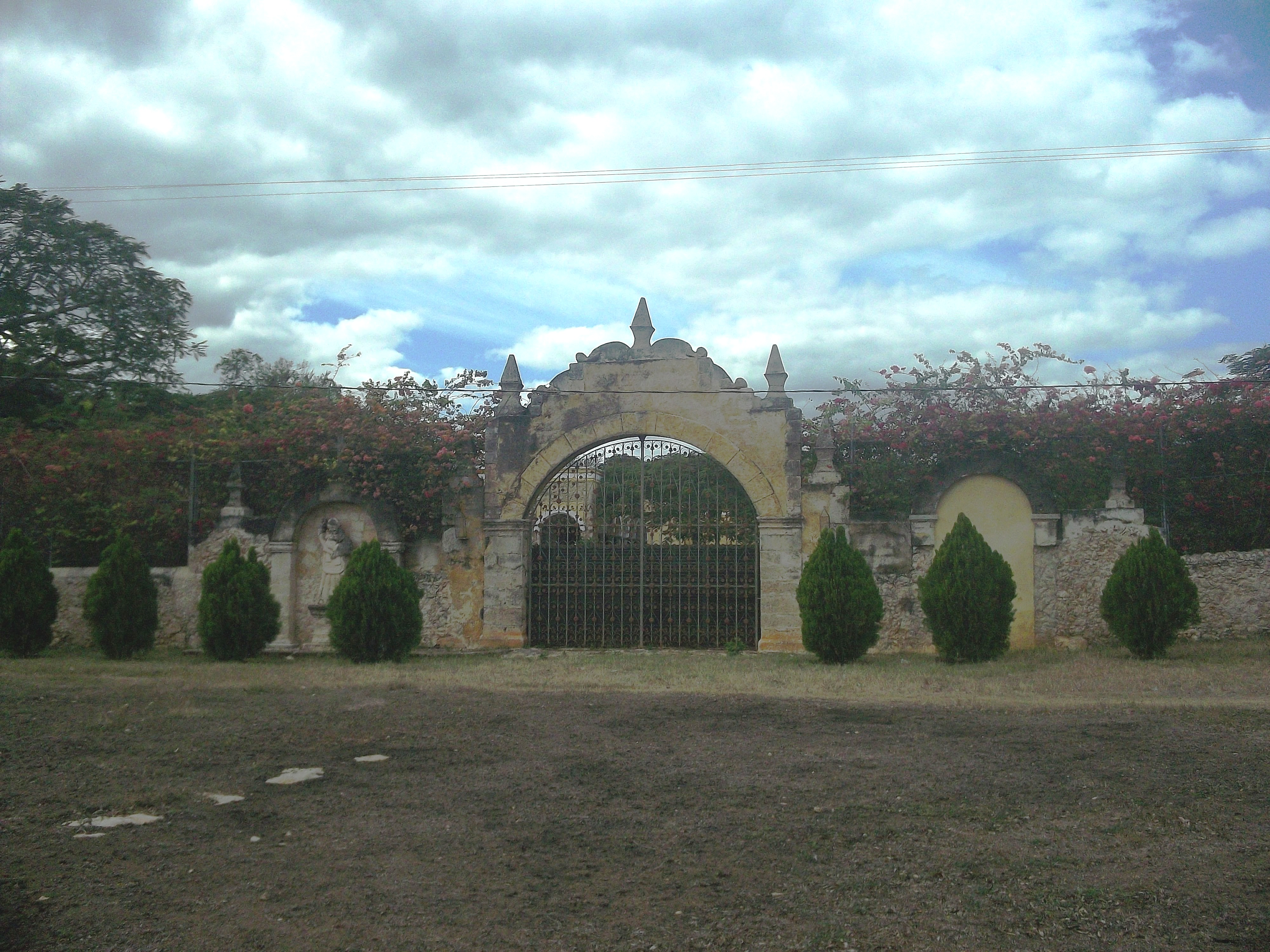 Vista de la hacienda San Bernardo (Kopomá), Yucatán.